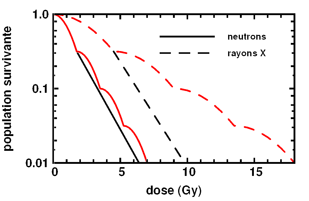 Proportion de survie d'une population de cellules de mammifères soumises à une dose radiative unique // Survival of a population of mammal cells when exposed to acute radiation.